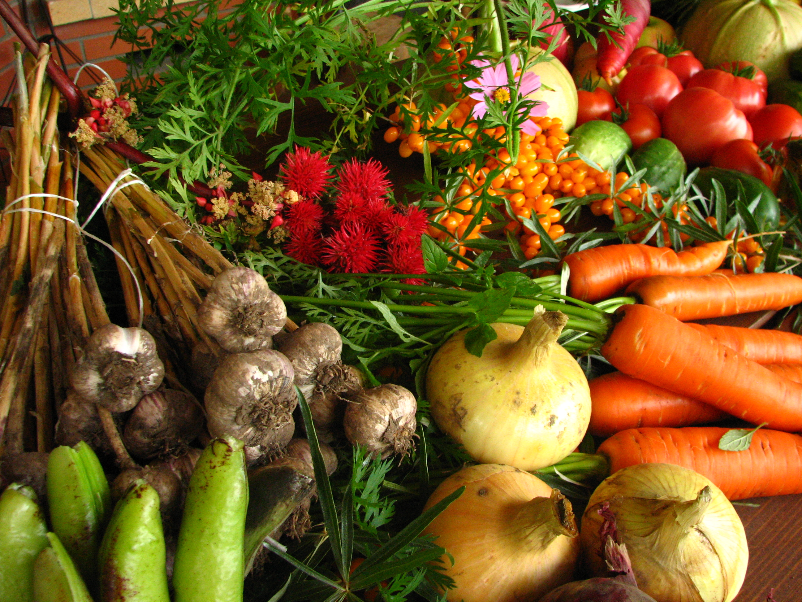 Maheköögivili